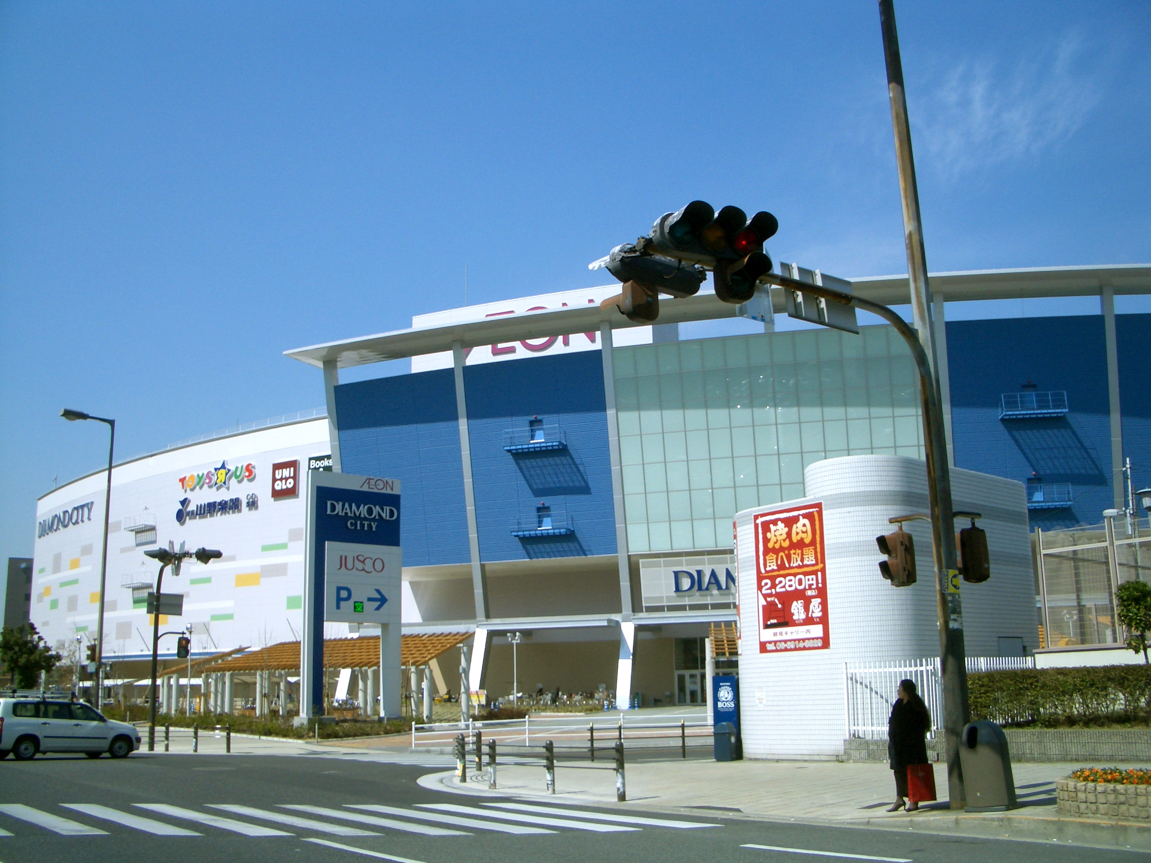 DIAMOND CITY Leafa,Tsurumi Tsurumi-Ku Osaka-City Osaka Japan.